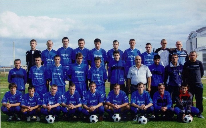 NK Stjepan Polje